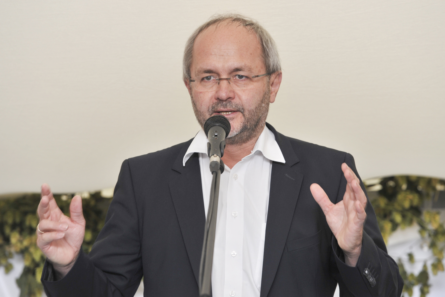 15. Station seiner Zukunftsenergientour: Windpark-Eröffnung in Bad Laasphe Auf der 15. Station seiner Zukunftsenergientour eröffnete NRW-Klimaschutzminister Johannes Remmel heute (11. September 2013) mit einer Delegation der EnergieAgentur.NRW einen Windpark in Bad Laasphe, der im Privatwald von Ludwig Prinz zu Sayn-Wittgenstein-Berleburg entsteht. Die sechs Windkraftanlagen mit einer Leistung von insgesamt 18 MW wurden von der wittgenstein new energy holding GmbH finanziert, geplant und umgesetzt. Der Park könnte den jährlichen Strombedarf der Stadt Bad Laasphe (14.000 Einwohner) vollständig decken.Das Beispiel zeigt: Moderne Windenergieanlagen können wirtschaftlich in Wäldern betrieben werden, weil sie mit einer Nabenhöhe von 140 Metern die windreichen und turbulenzarmen Zonen über den Wipfeln technisch nutzbar machen. Flickr tags: NRW; Klimaschutz-Minister Johannes Remmel; 2013; Klimaschutztour; Bad Laasphe; wittgenstein new energy holding GmbH; Windkraft; Windpark; erneuerbare Energien